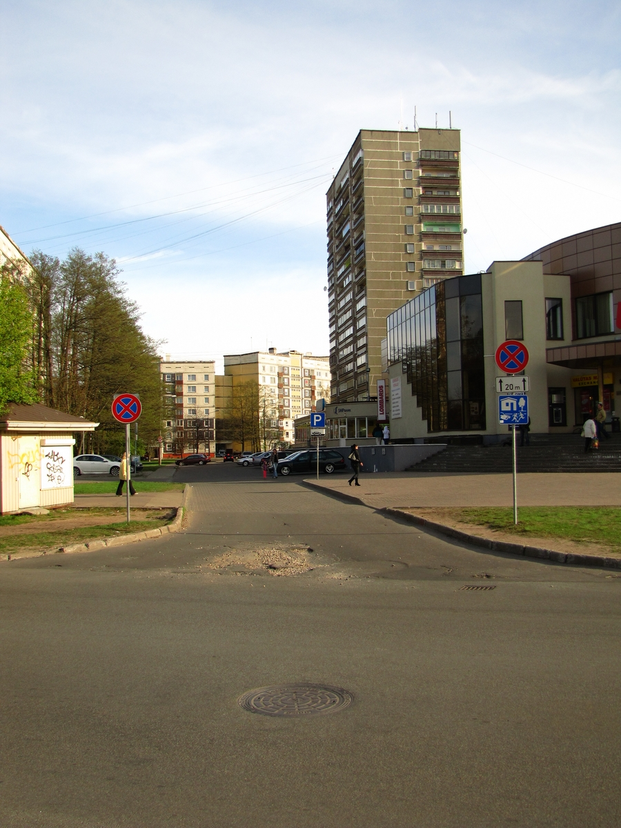 Zolitude